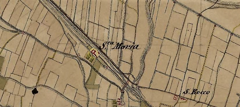 La mappa ottocentesca del paese di Ghedi con la posizione del convento